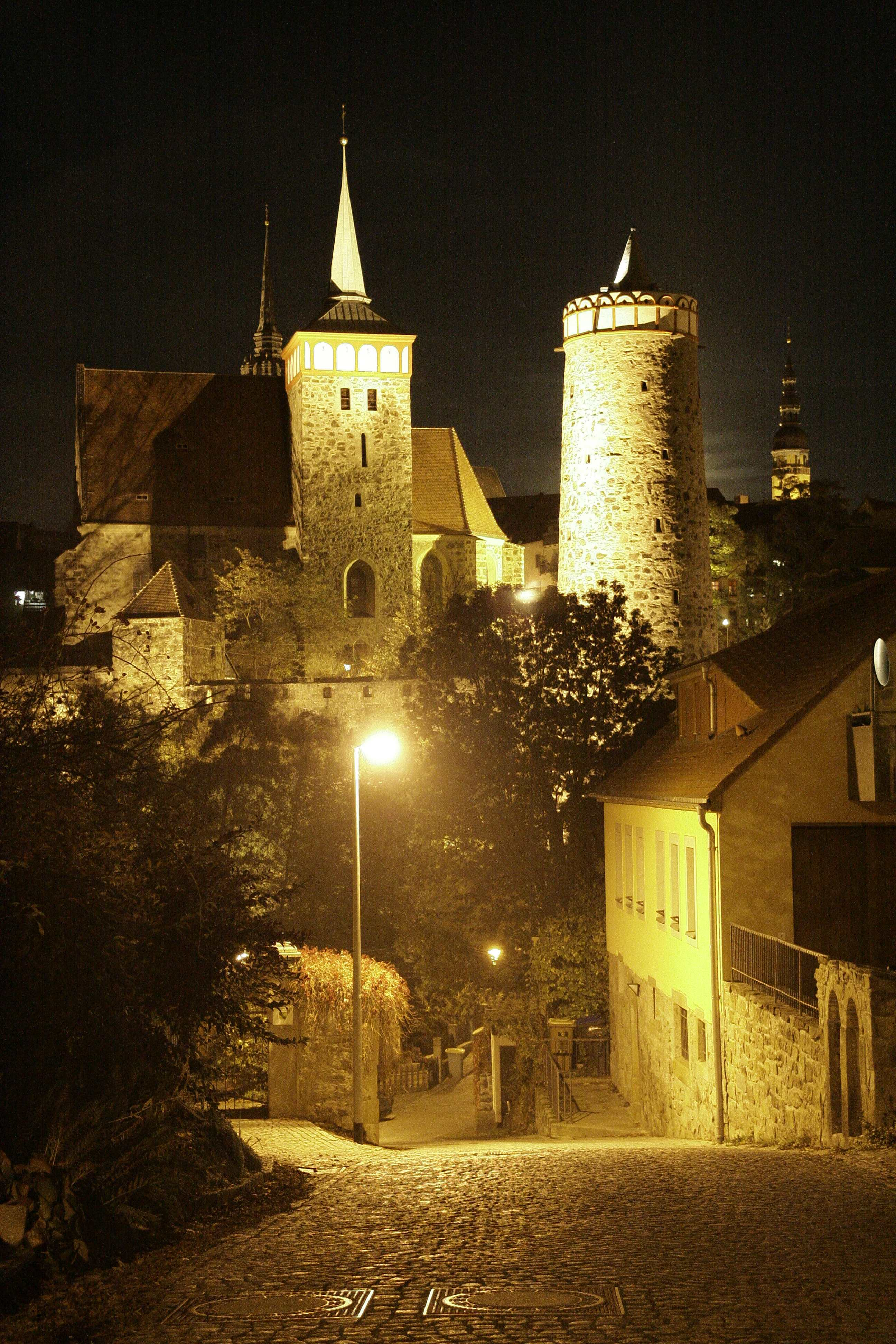 Blick auf die Wasserkunst vom Scharfenweg aus